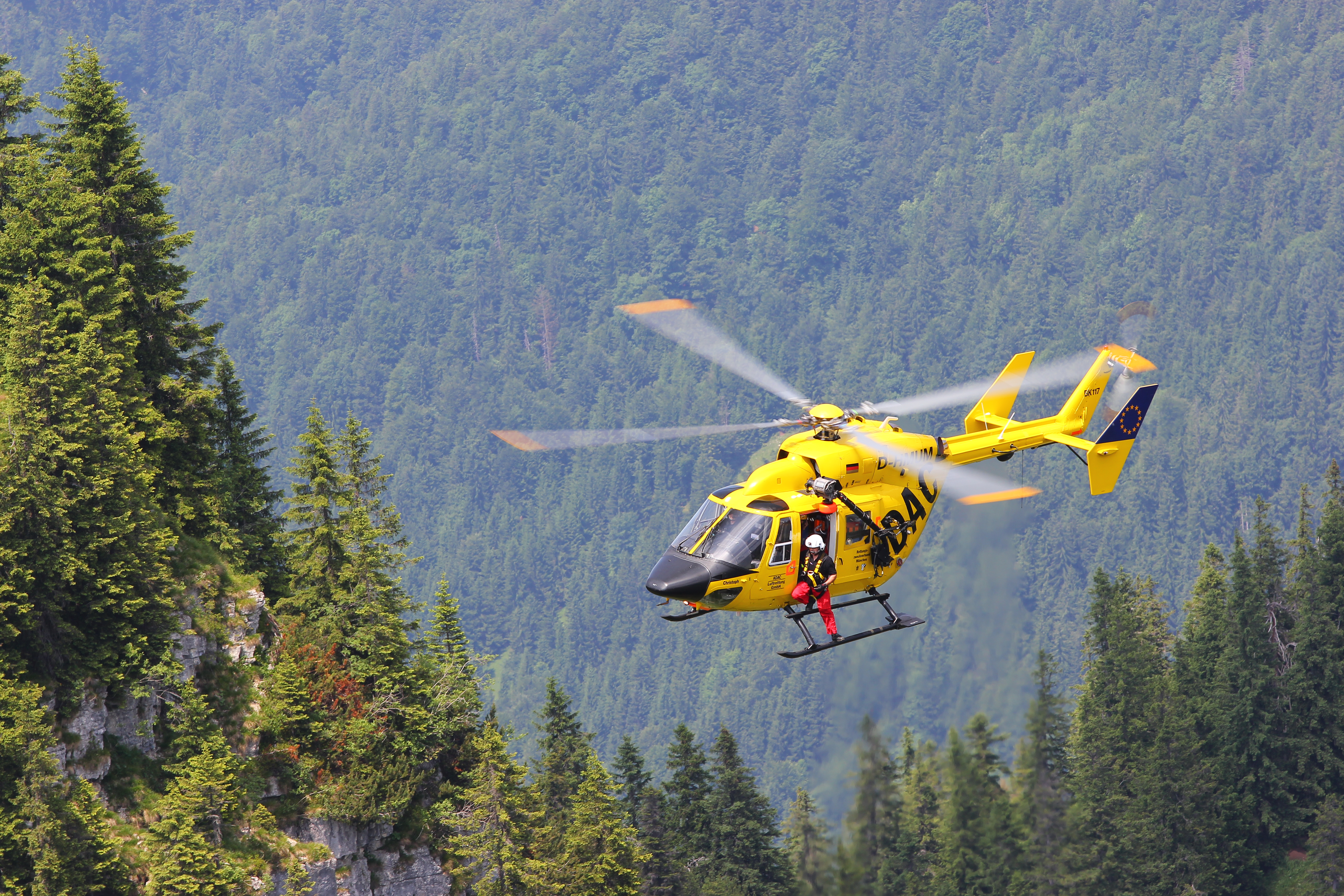 Bergrettung am Bodenschneid-Gipfel der 'Christoph 1', D-HMUM.